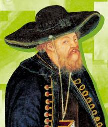 Retrato de Antonio de Montserrat